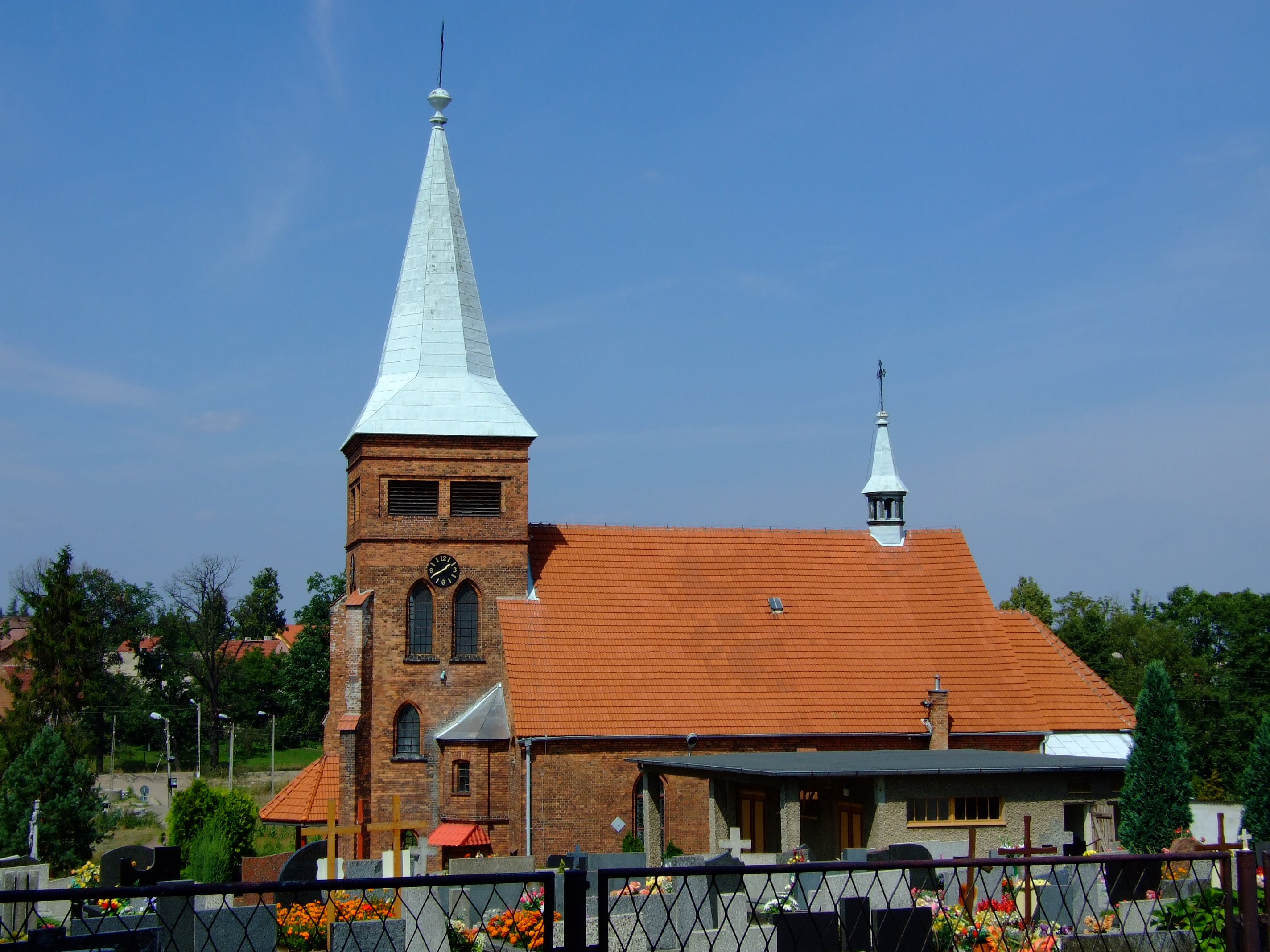 Kościół św. Jadwigi w Gliwicach